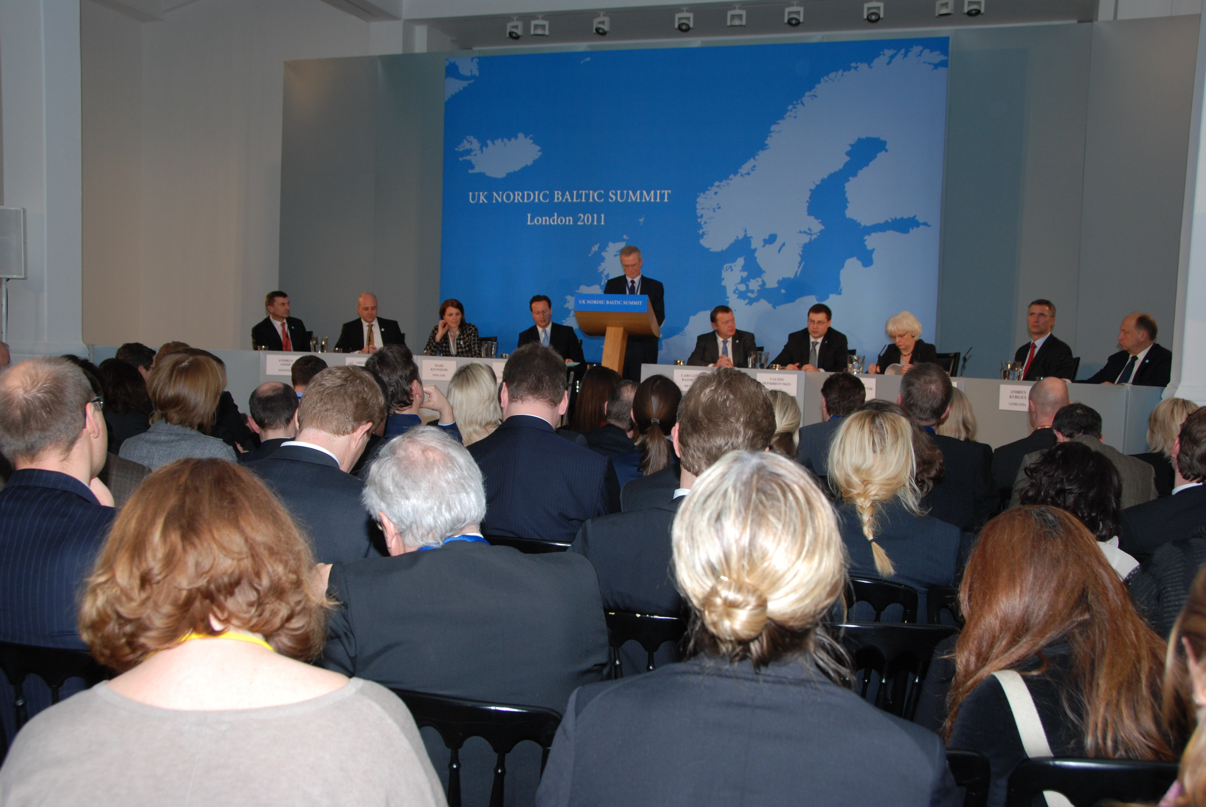 Apvienotās Karalistes, Ziemeļvalstu un Baltijas valstu valdību vadītāji samitā par modernās Ziemeļeiropas ekonomikas izaicinājumiem Foto: Līga Krapāne, Ministru prezidenta birojs